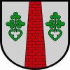 Wappen der ehemaligen Gemeinde Stallhof, Steiermark